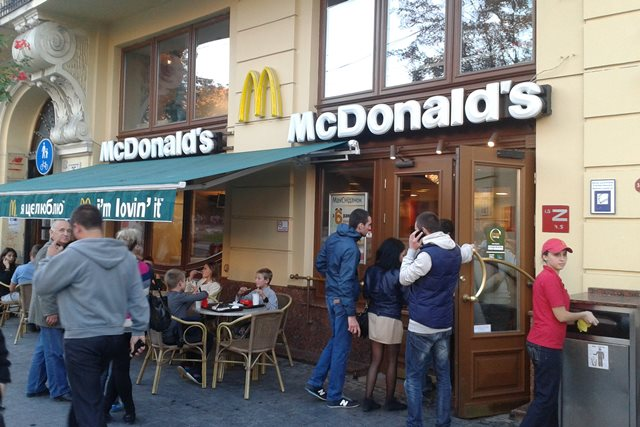 МакДональдс на Проспекте Свободы во Львове.